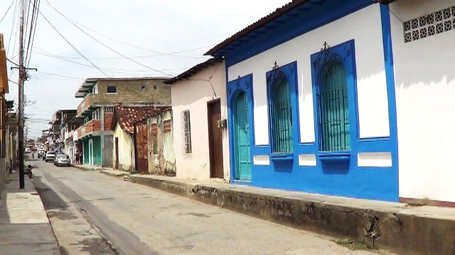 Tacarigua de Brión en el estado Miranda, casas coloniales de la calle comercio. Barlovento.